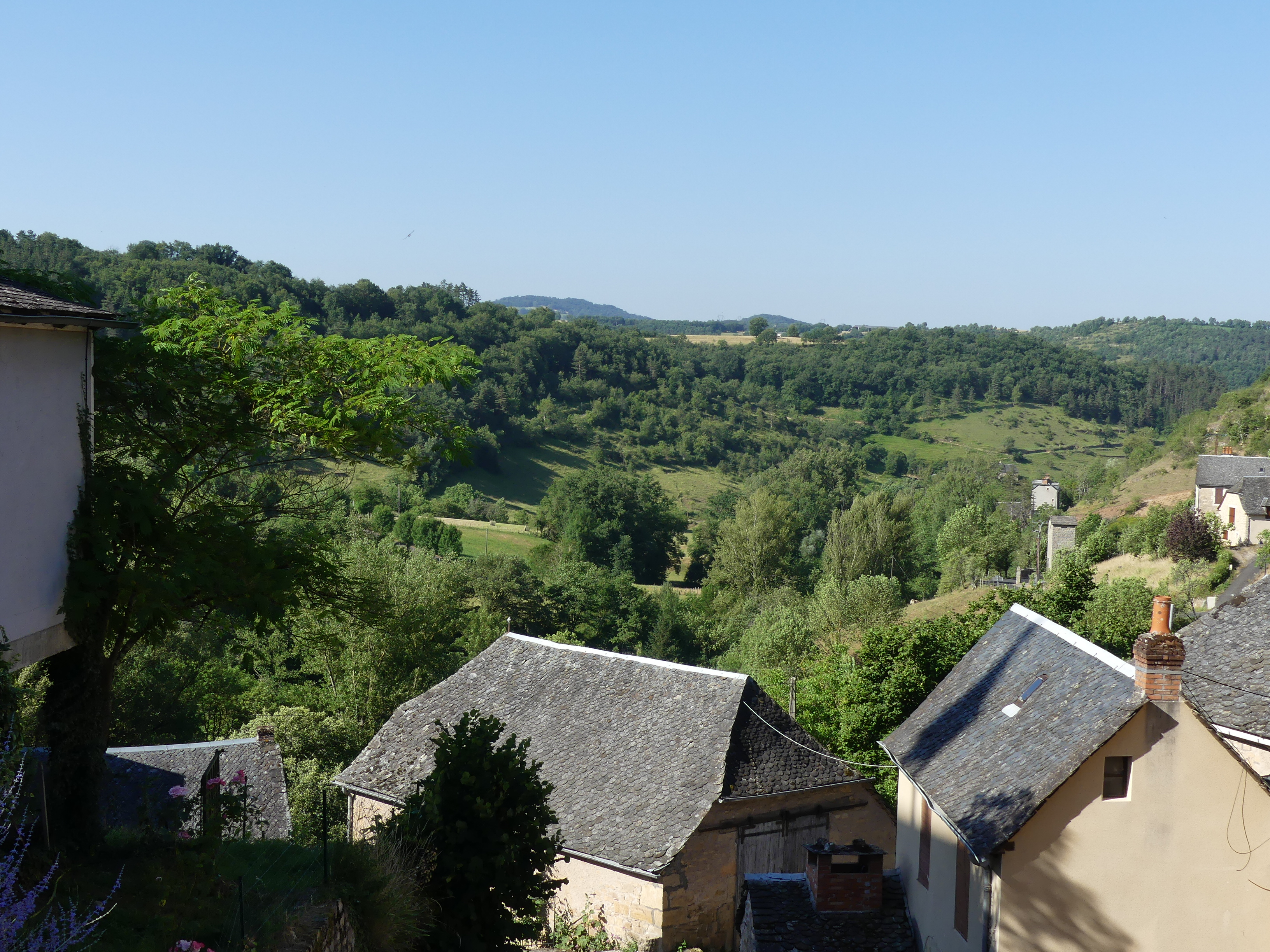 Le vallon du ruisseau de Coubisou, vu depuis le village de Coubisou, Aveyron, France.